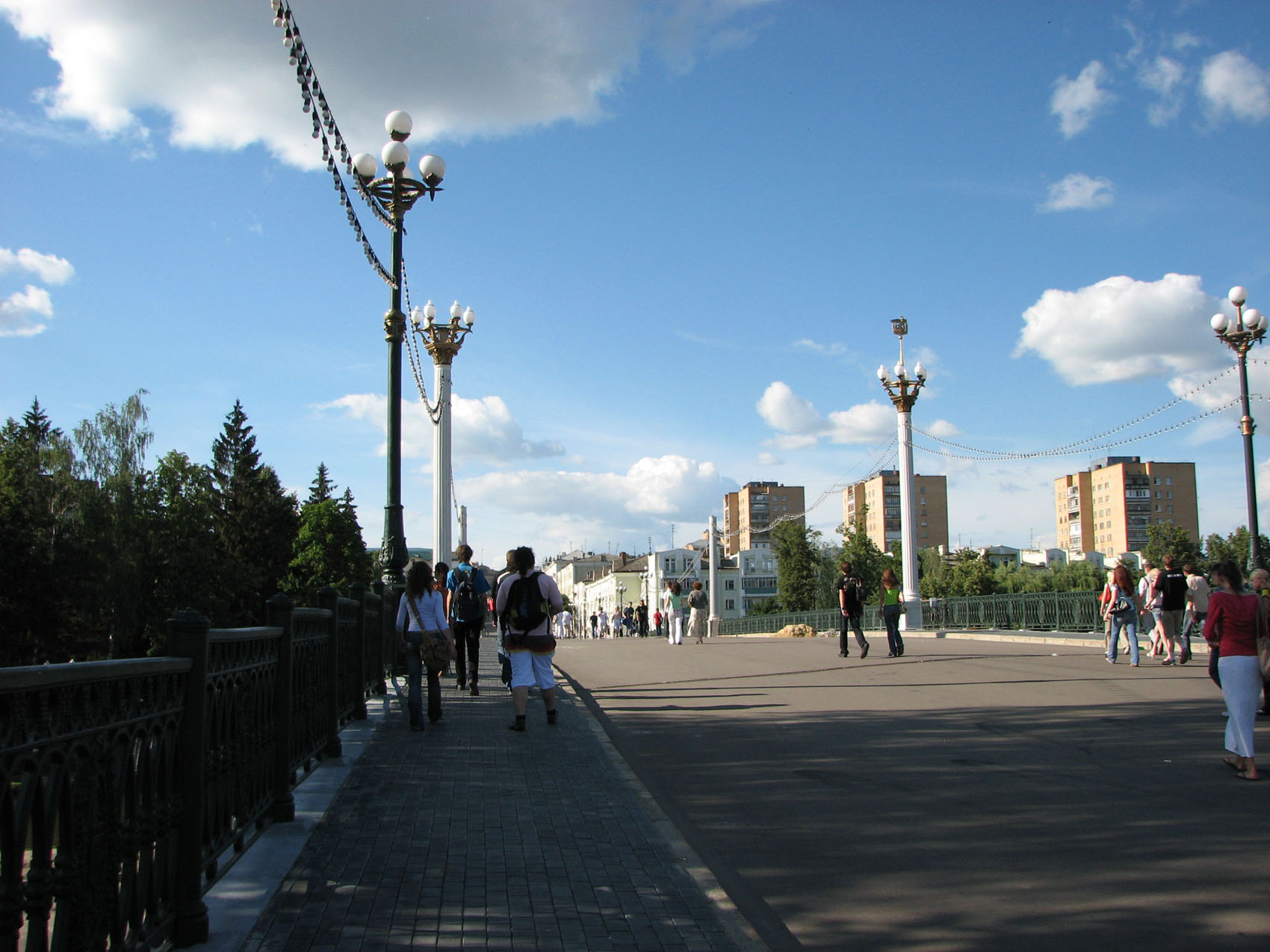 г. Орёл